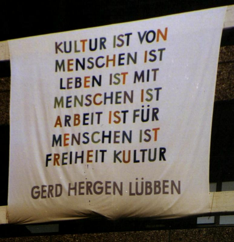 Text-Transparent — 1988 in Essen aus dem Fenster gehängt.